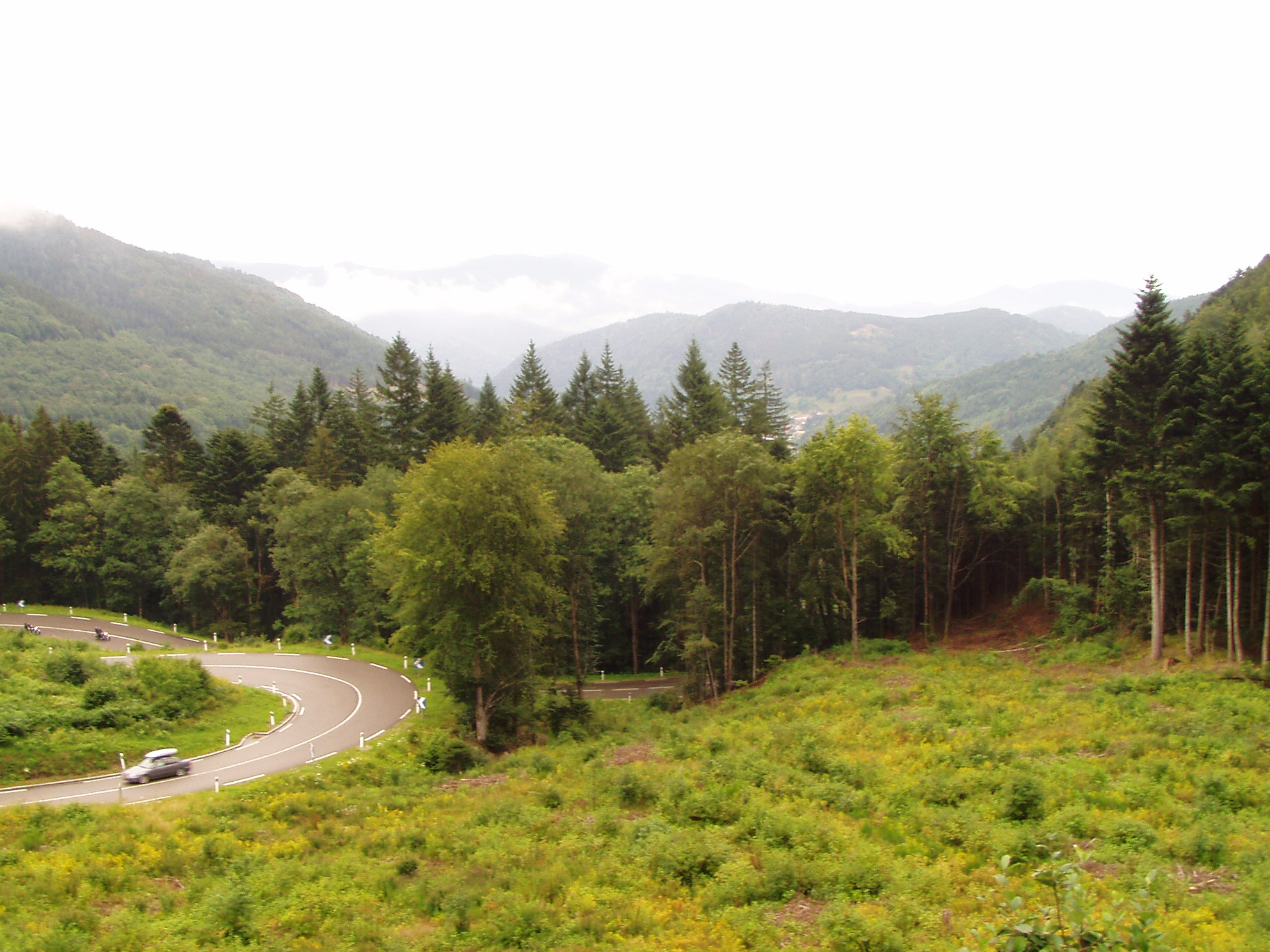 le Col de Bussang, descente vers l'Alsace